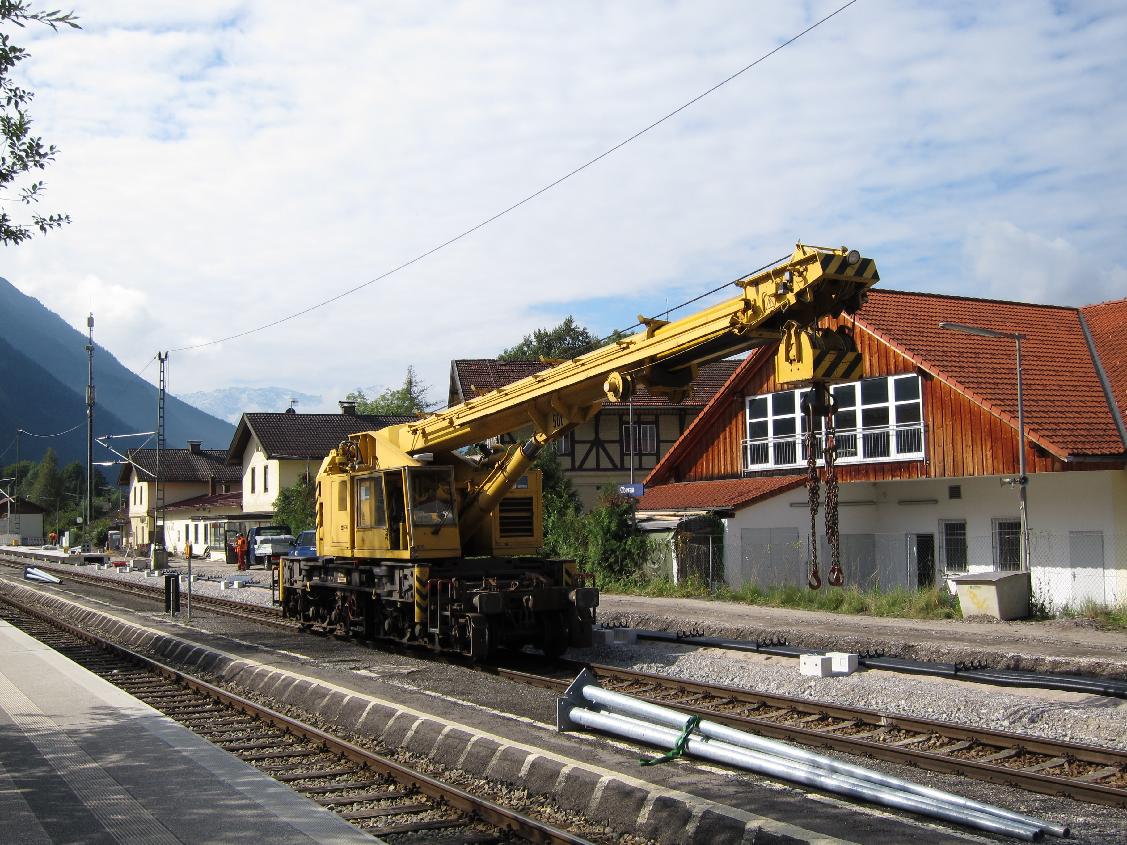 Der KIROW Schienenkran bringt die Bahnsteigteile an ihren Platz.